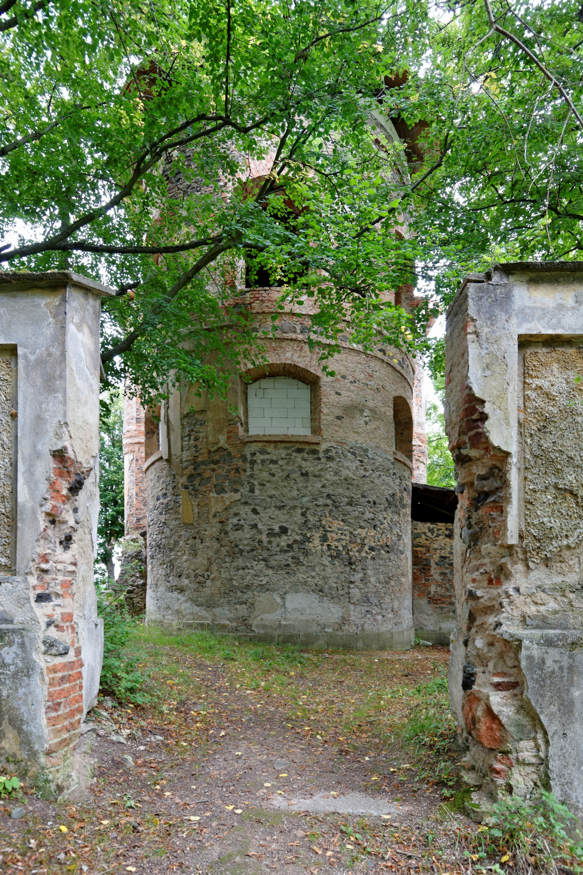 Kostel Nanebevzetí Panny Marien ve Svatoboru (Zwetbau). Závěr kostela.